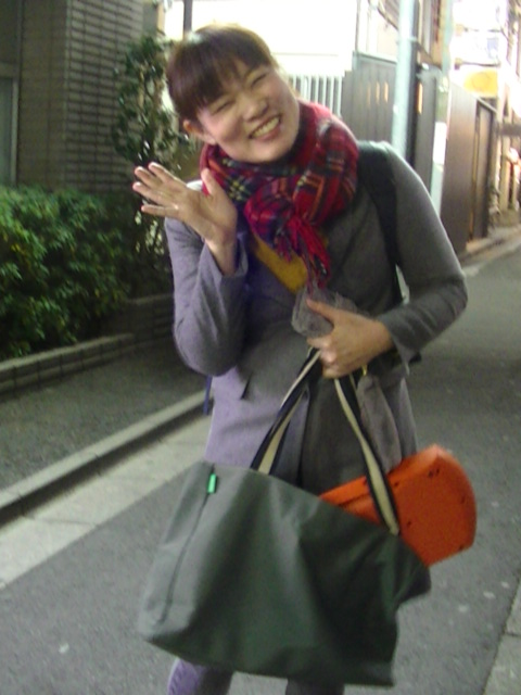 まとばゆう (2017年12月)